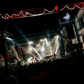 Concert Nuit des forges au Parc des Ateliers / Copyright Stephane Barbier